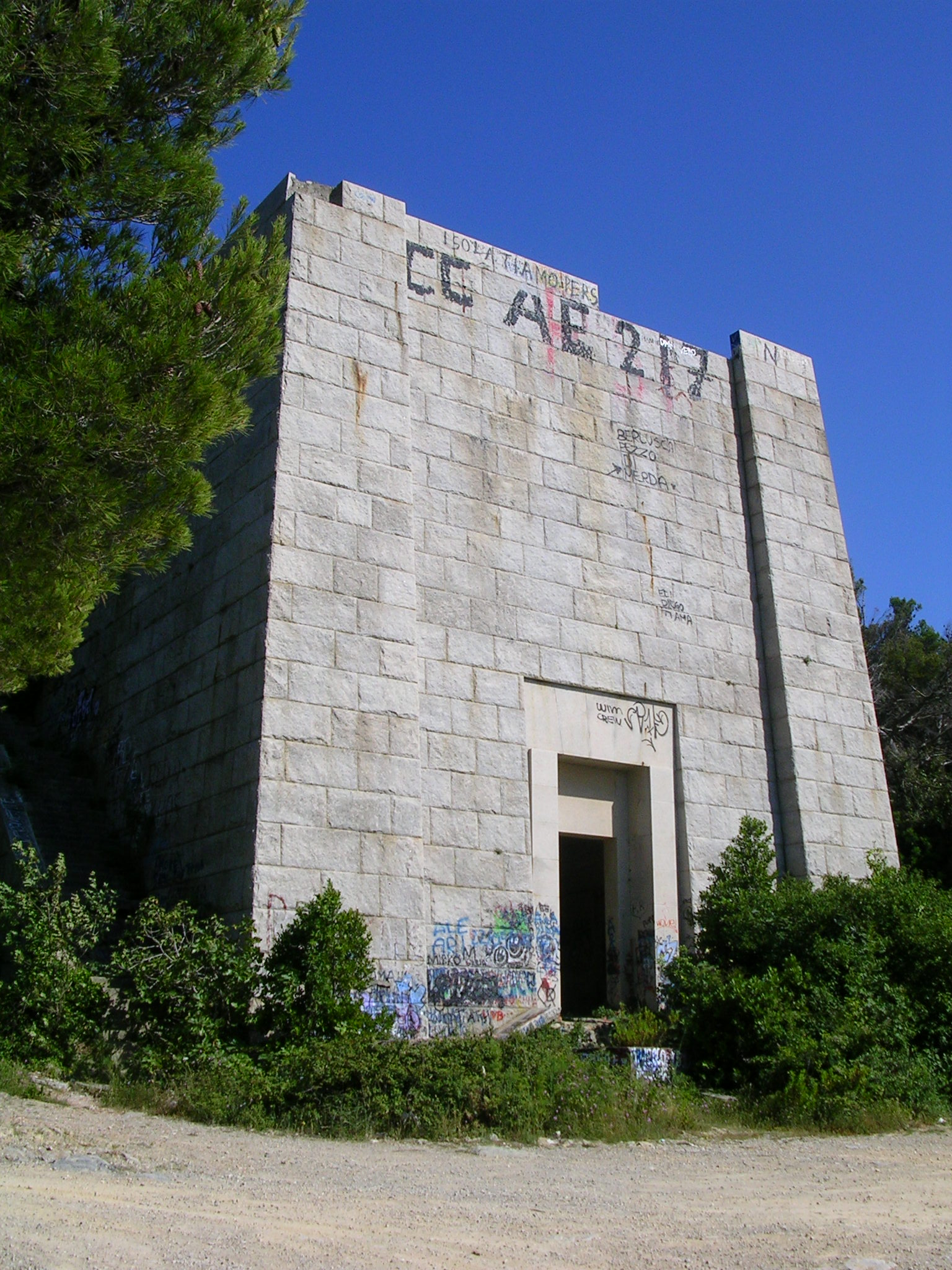 Livorno: resti del basamento del Mausoleo di Costanzo Ciano (1939/1943), padre del gerarca fascista Galeazzo Ciano. L'opera, progettata da Gaetano Rapisardi, doveva essere completata da una statua di Costanzo Ciano, alta 13 metri, e da un fascio littorio colossale. La costruzione fu interrotta al momento della fucilazione di Galeazzo, ed ovviamente mai ripresa.